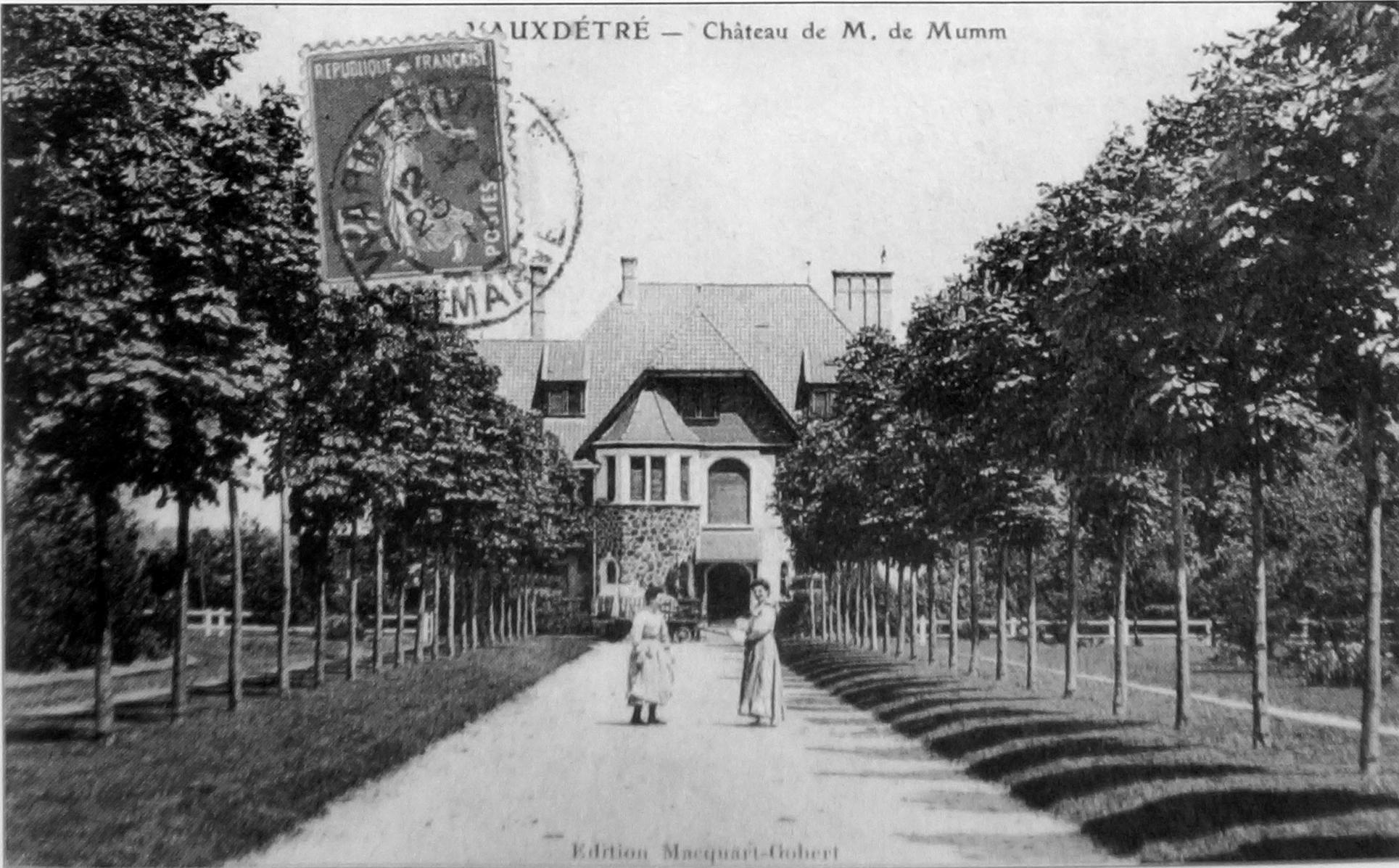 sur une carte postale.